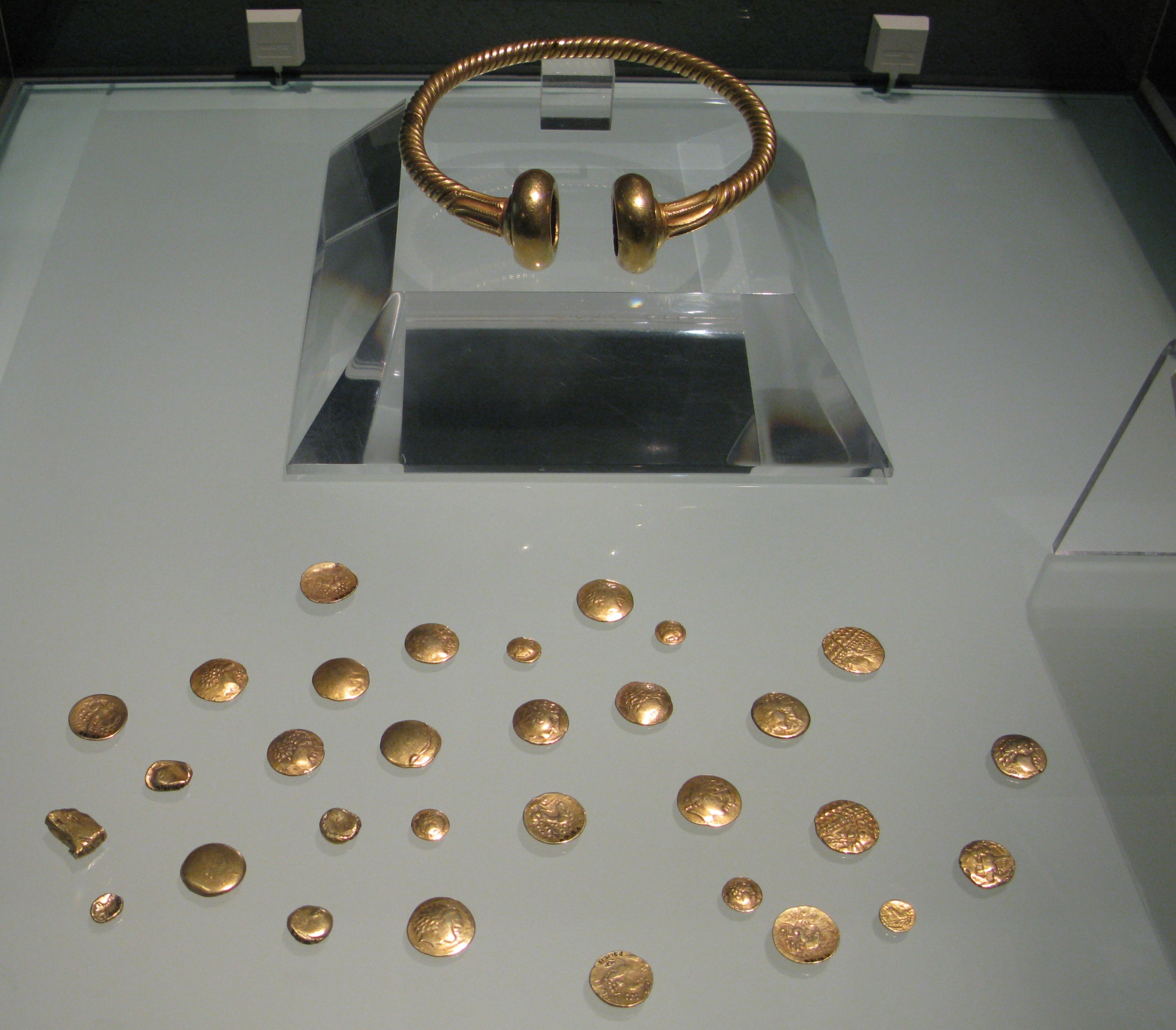 Trésor de Tayac exposé au musée d'Aquitaine